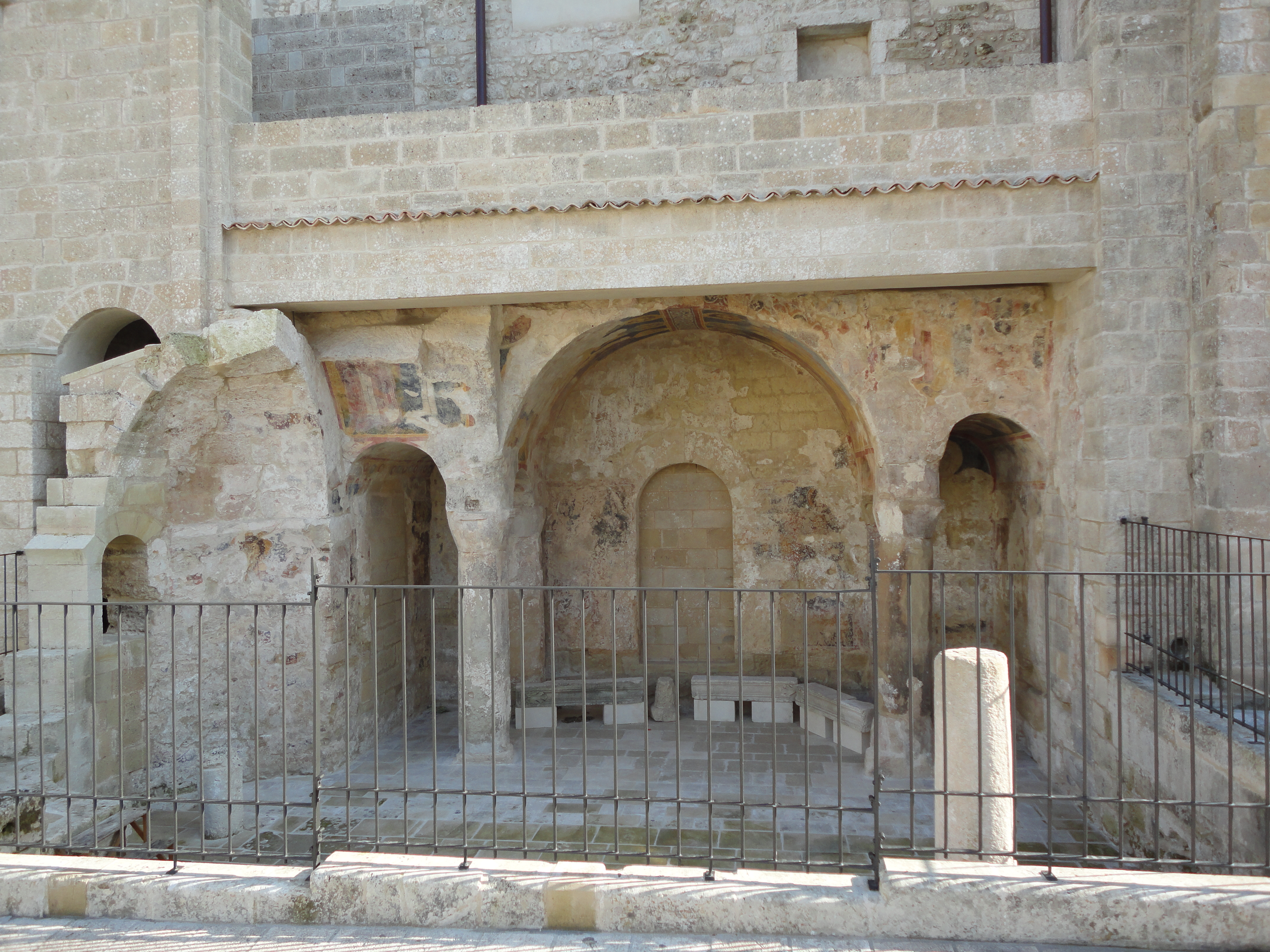 Chiesa Bizantina di Castro, Lecce